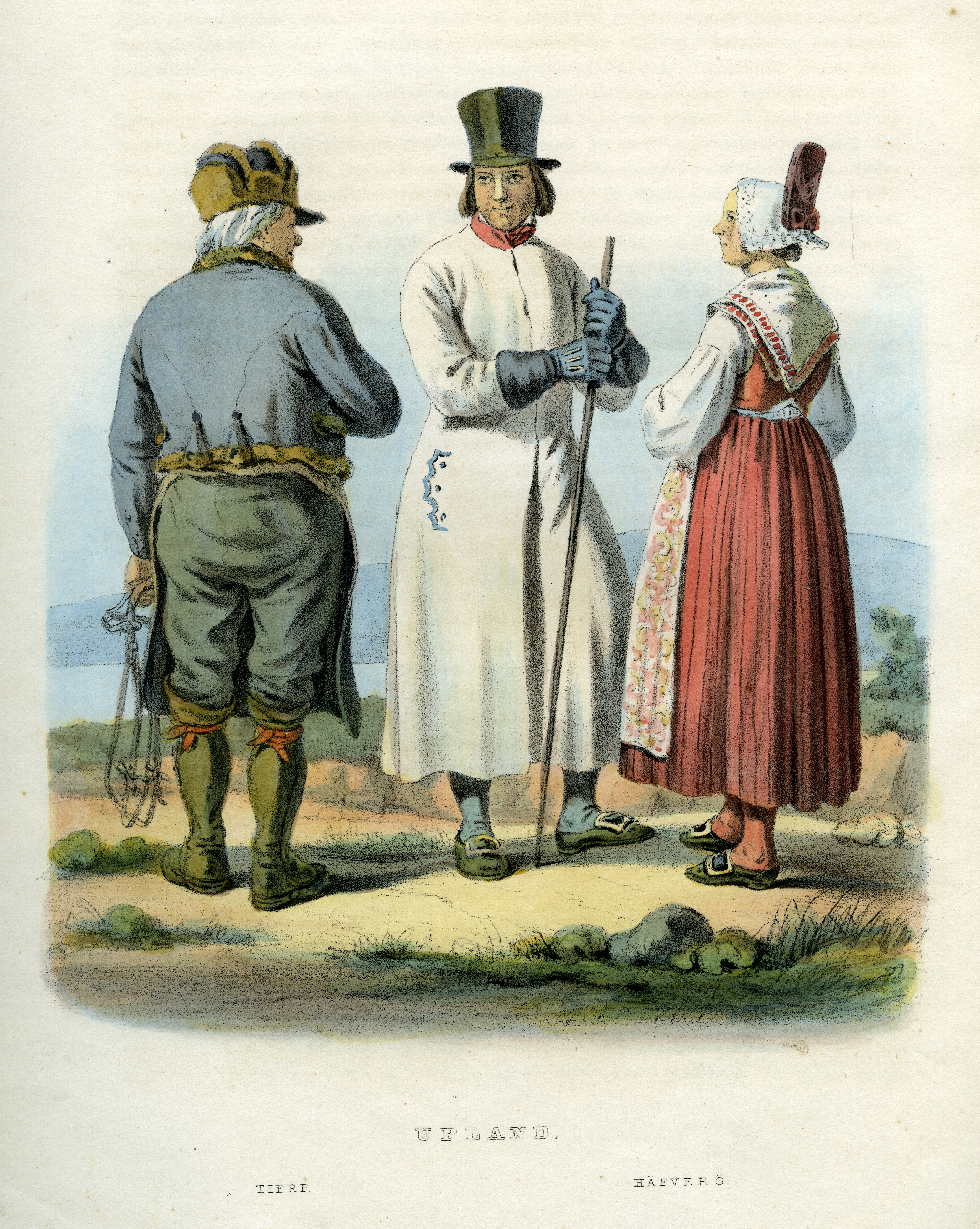 Folkdräkter från Tierp och Häverö, Uppland, Sverige. Plansch ur Svenska folkets seder, bruk och klädedrägter (1863) tecknad av Carl Anders Dahlström.